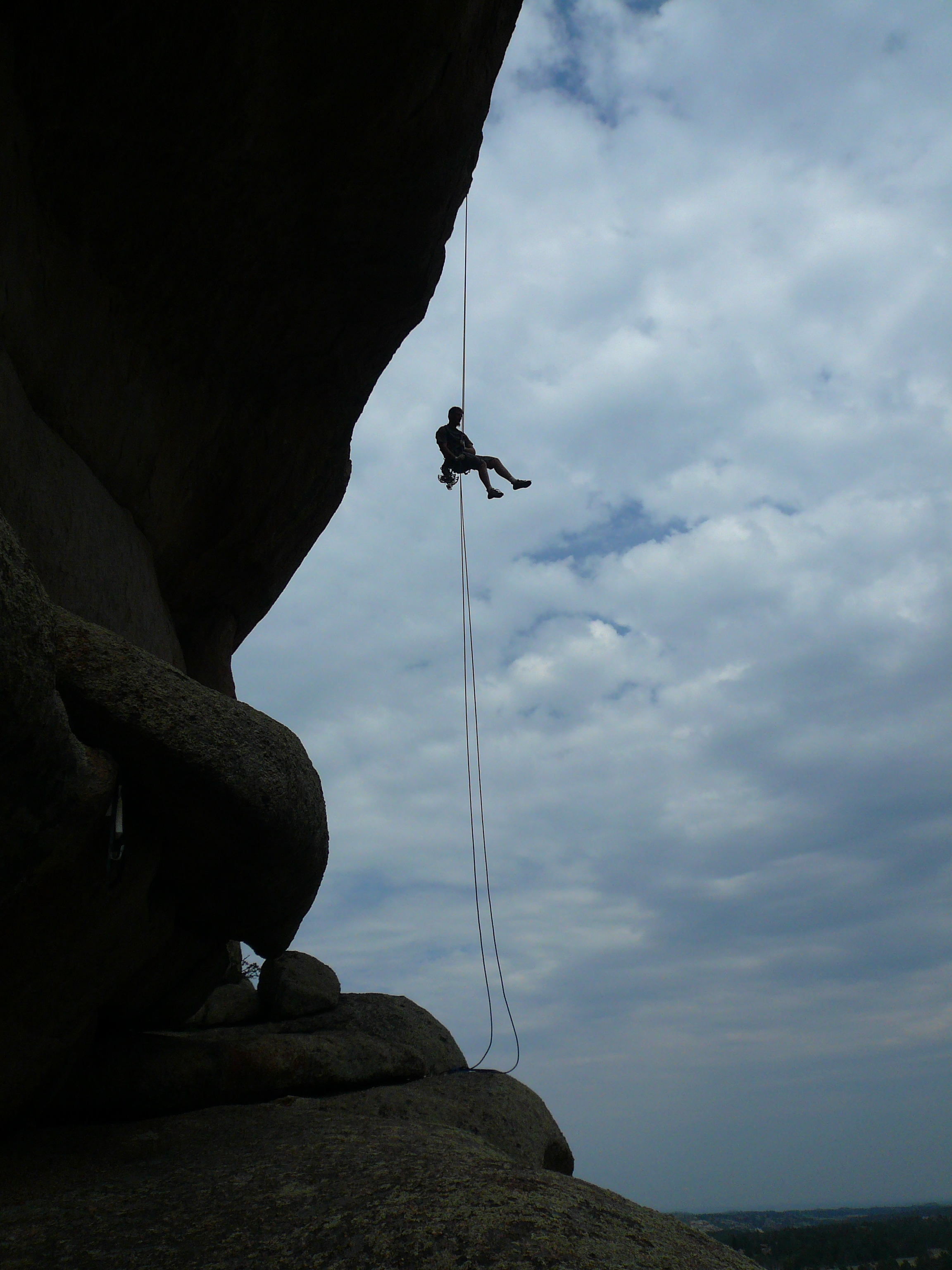 Climber in Vedauwoo